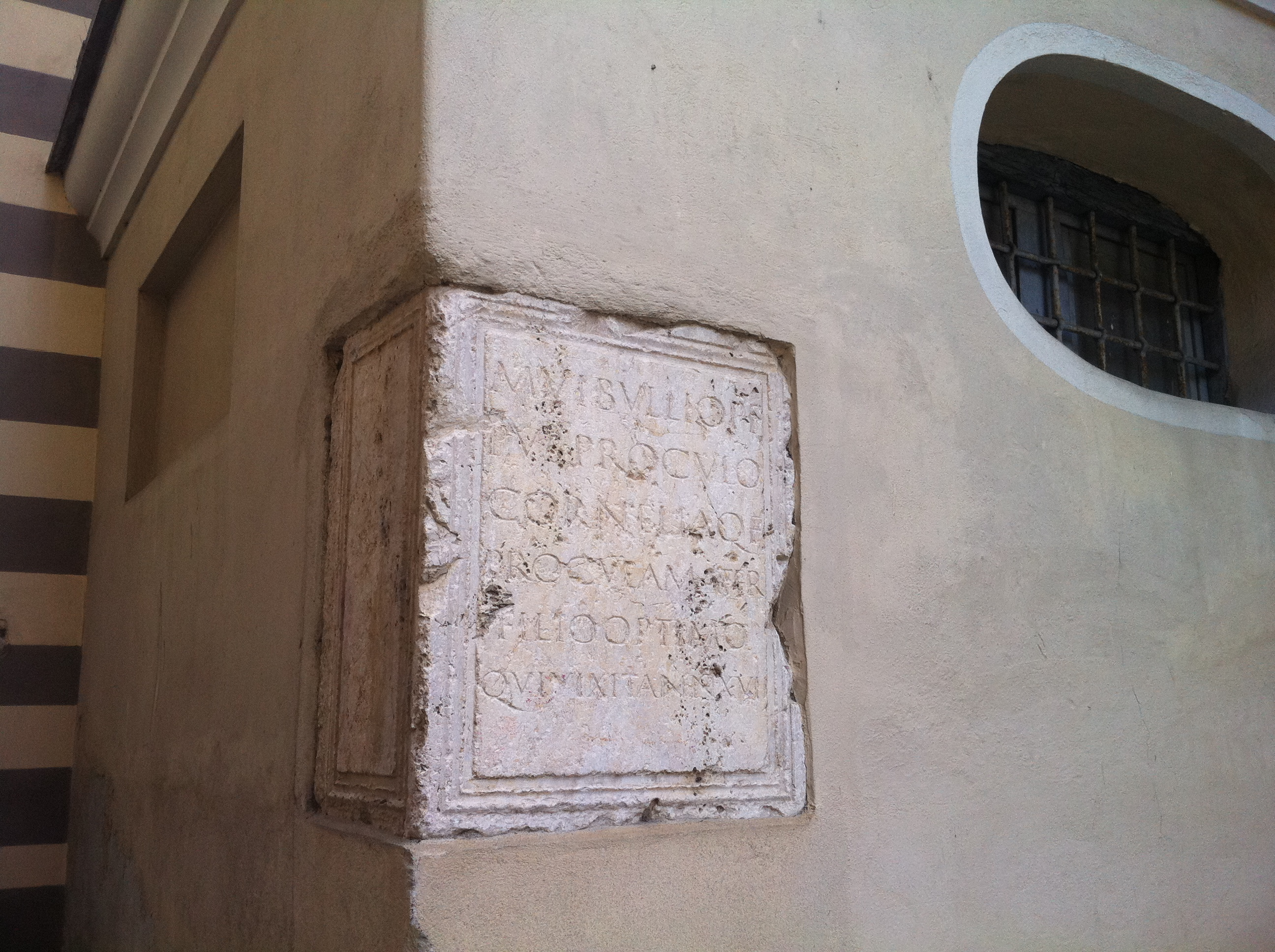 Ceppo di marmo sul retro di Santa Maria in Fontibus